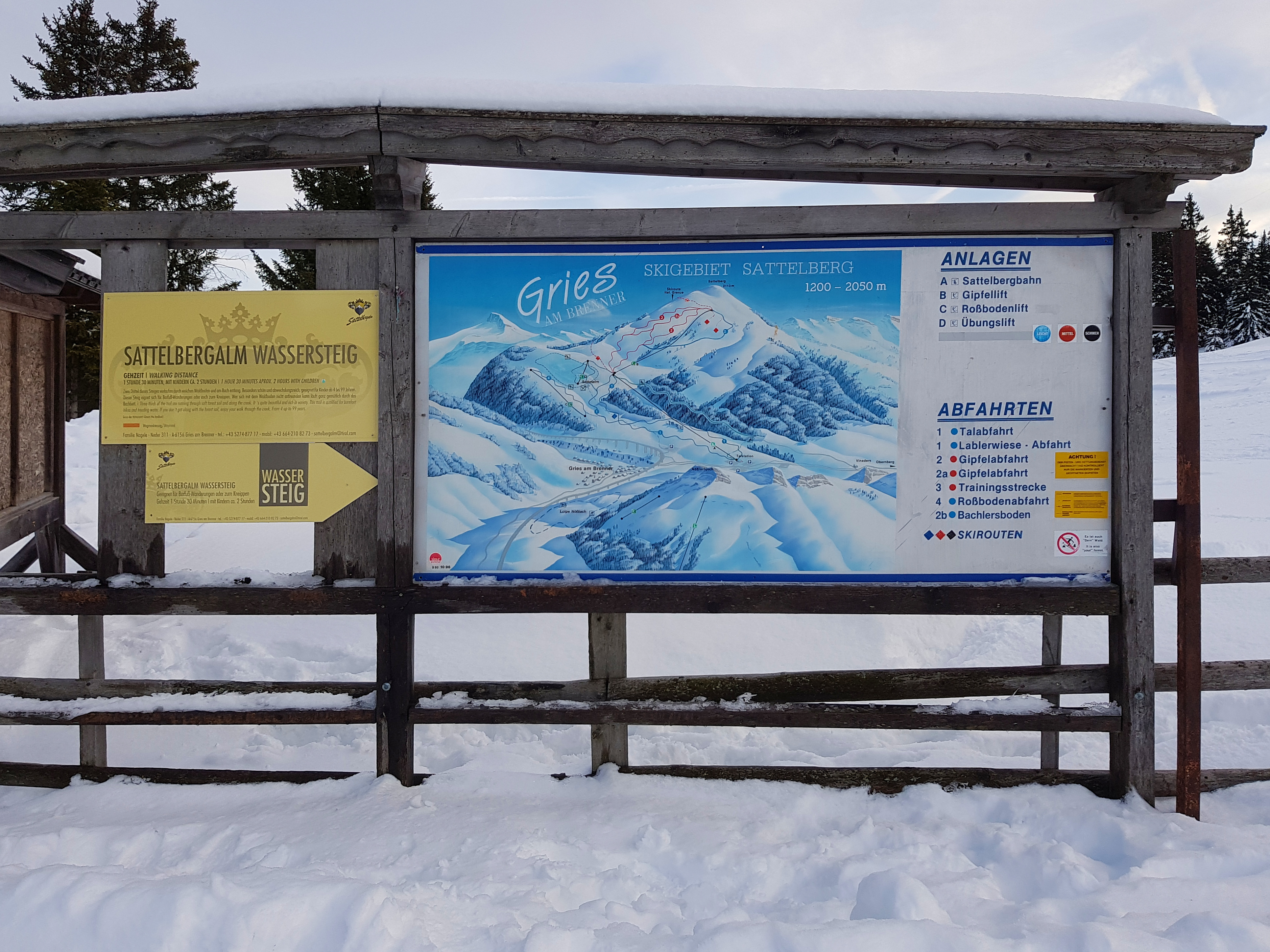 Informationstafel zum seit 2006 nicht mehr bestehenden Skigebiet Sattelberg